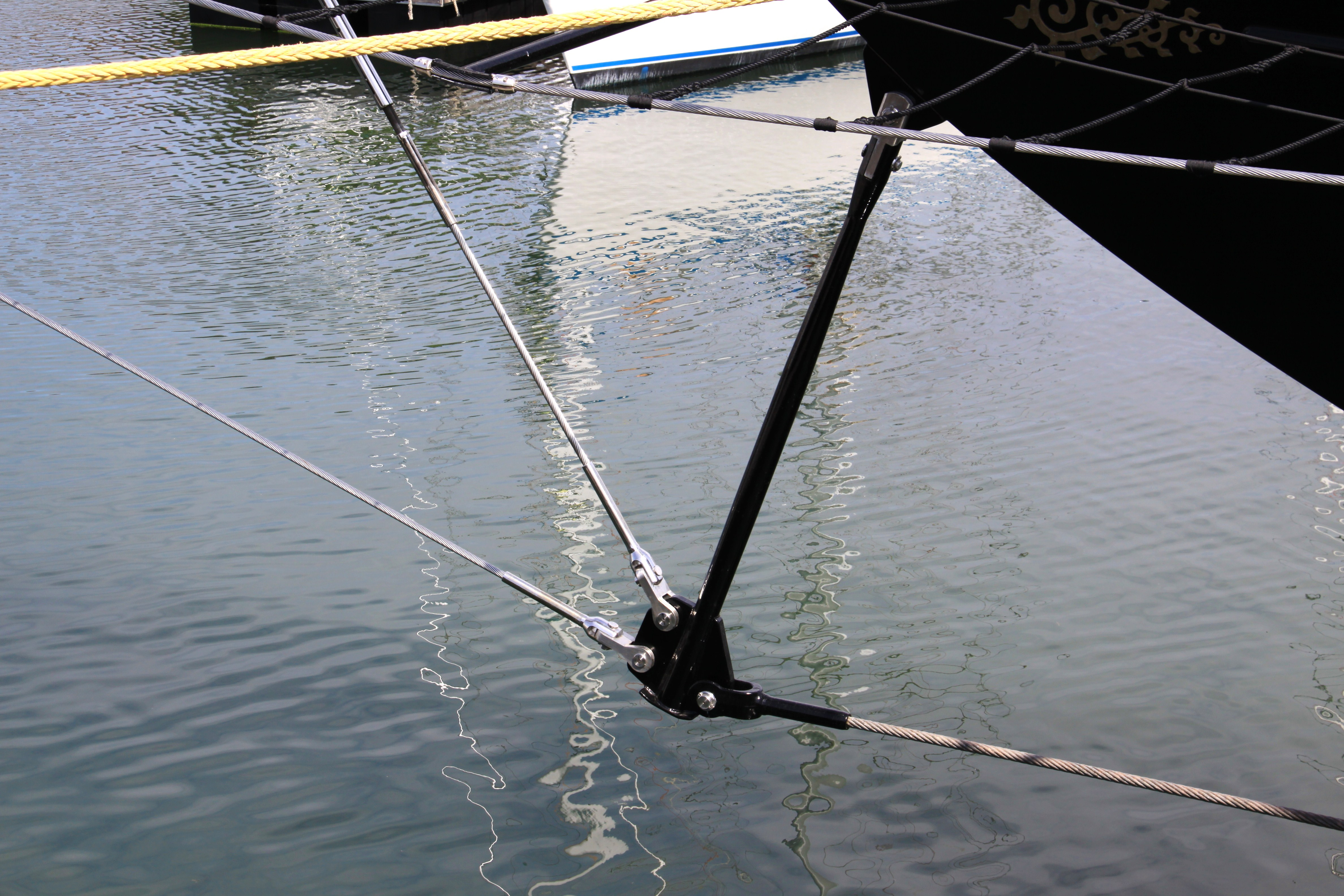 Plan rapproché sur la civadière (arc-boutant) de la goélette Atlantic lancée en 2008. Ce bateau est la réplique de la géolette Atlantic de 1903. Photographie prise en juillet 2010, lors de l' escale technique de la goélette Atlantic à La Rochelle où les dernières finitions ont été effectuées avant sa mise en service. La Rochelle, Charente Maritime, France.